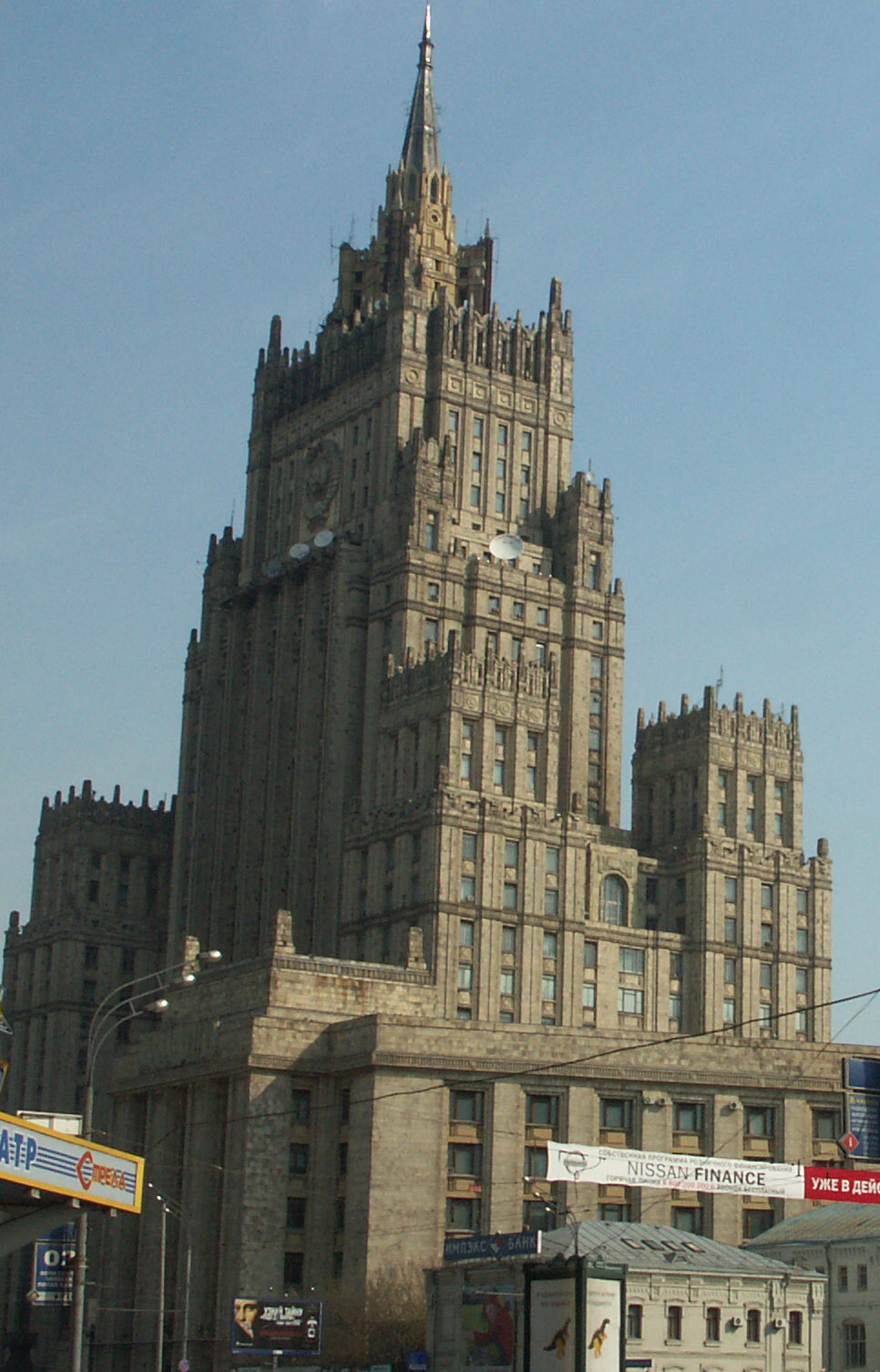 МИД РФ Автор: User:Glaue2dk Дата: 2006-04-29